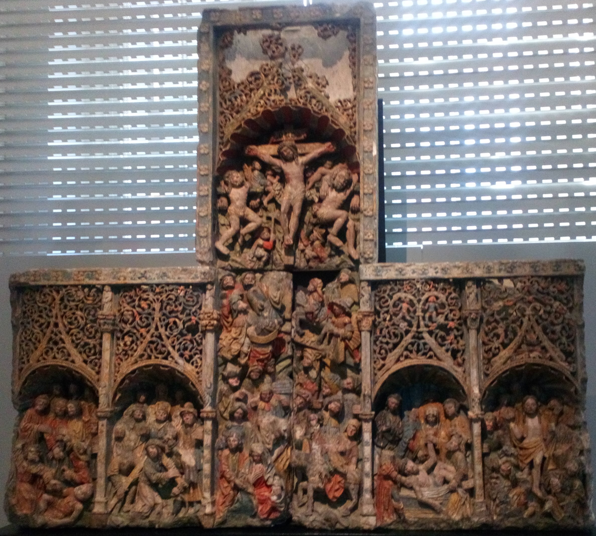 Retable de la Passion provenant de l'église de Méharicourt (XVIe siècle), musée de Picardie, Amiens.